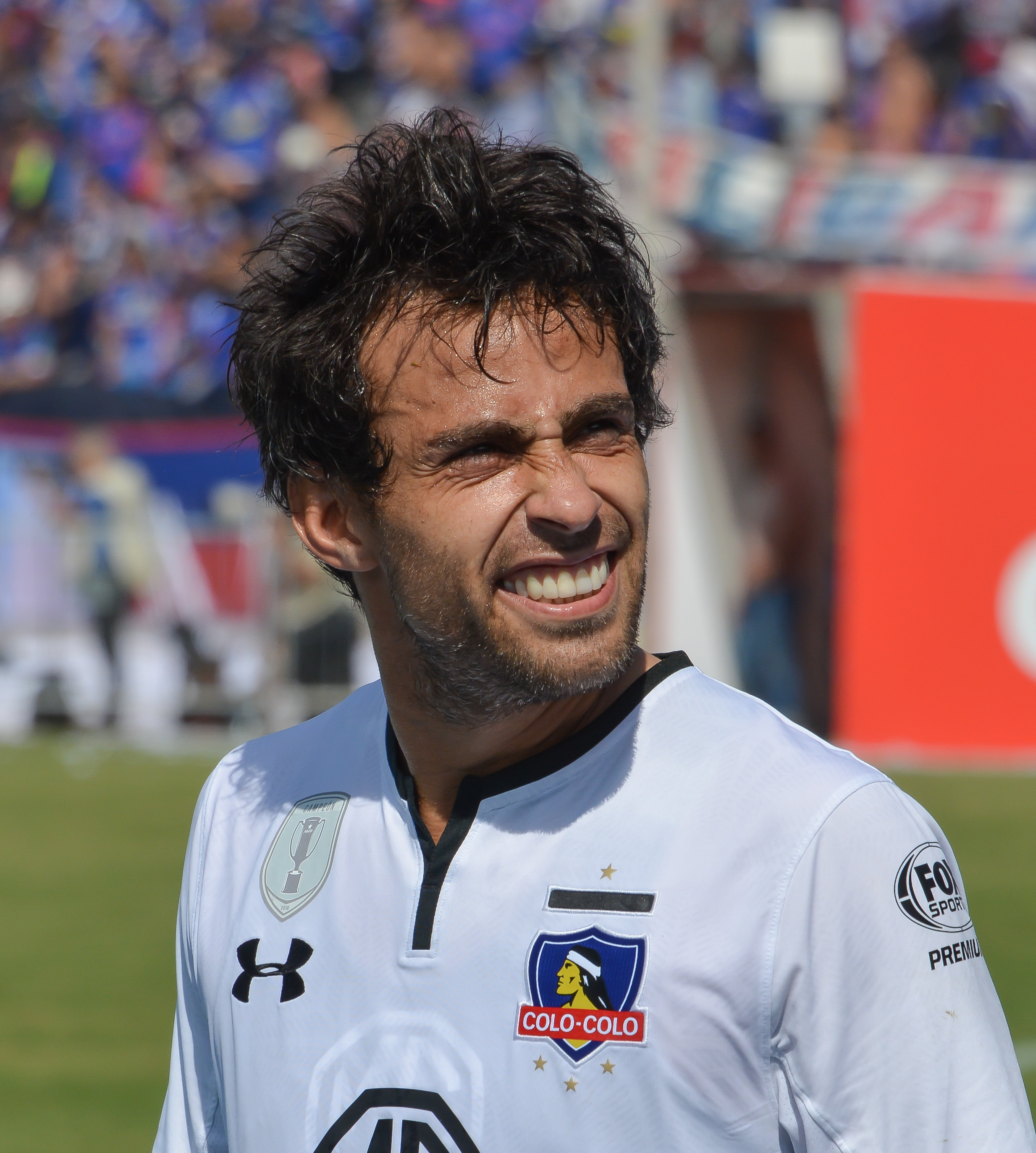 Jorge Valdivia, Universidad de Chile v Colo-Colo, Estadio Nacional, Santiago, Chile.